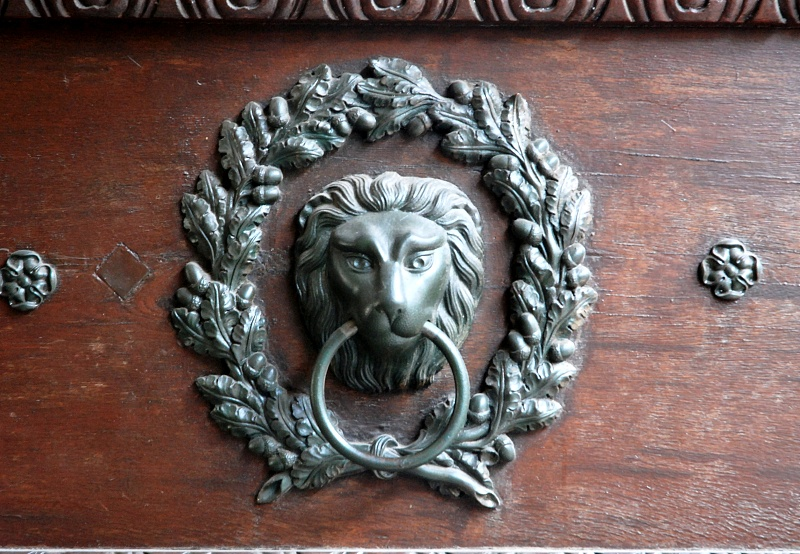 Klepadlo - Praha, Národní, Platýz